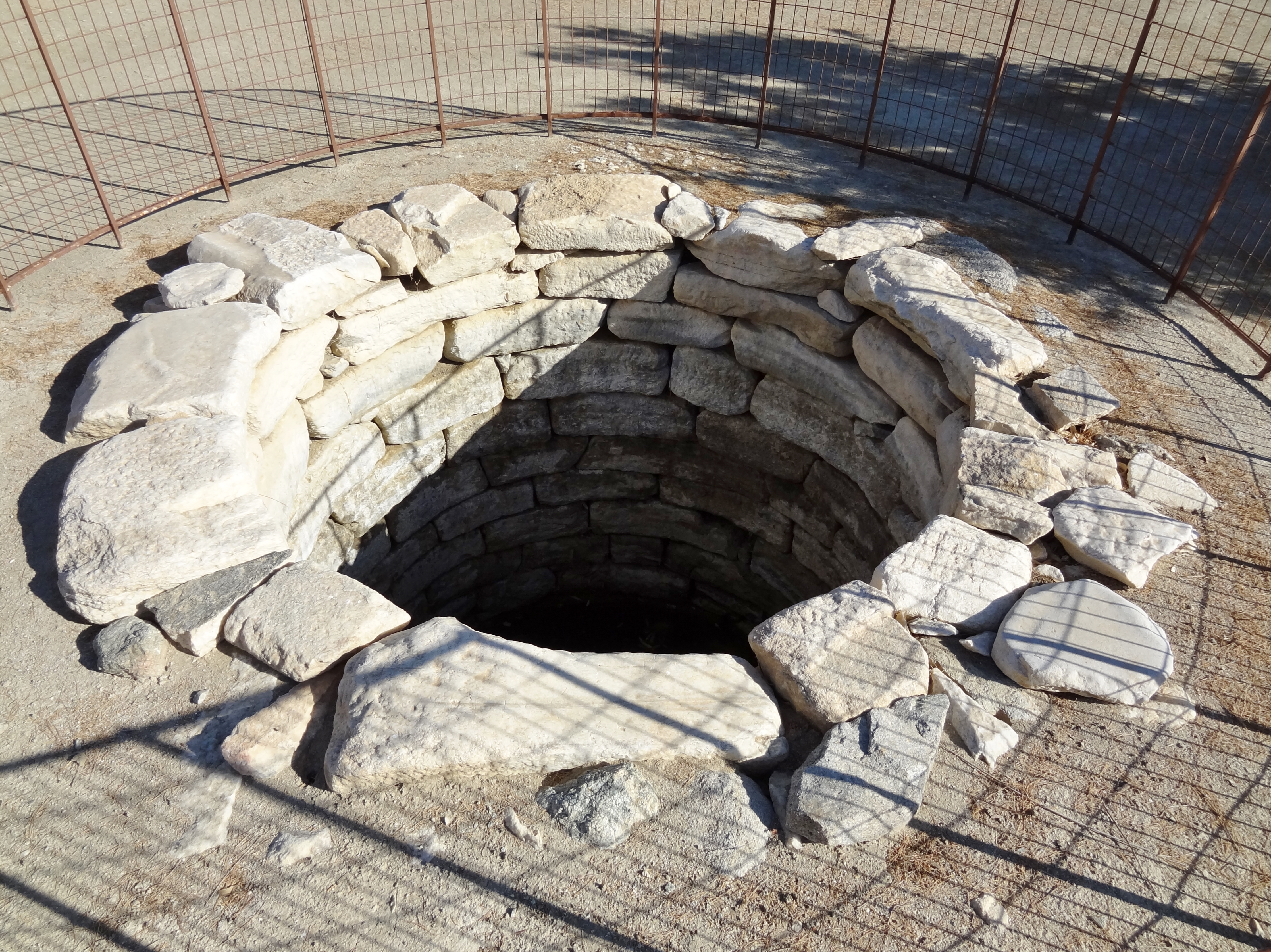 Brunnen auf dem Gelände des Tempels des Dionysos von Yria auf Naxos, Kykladen, Griechenland